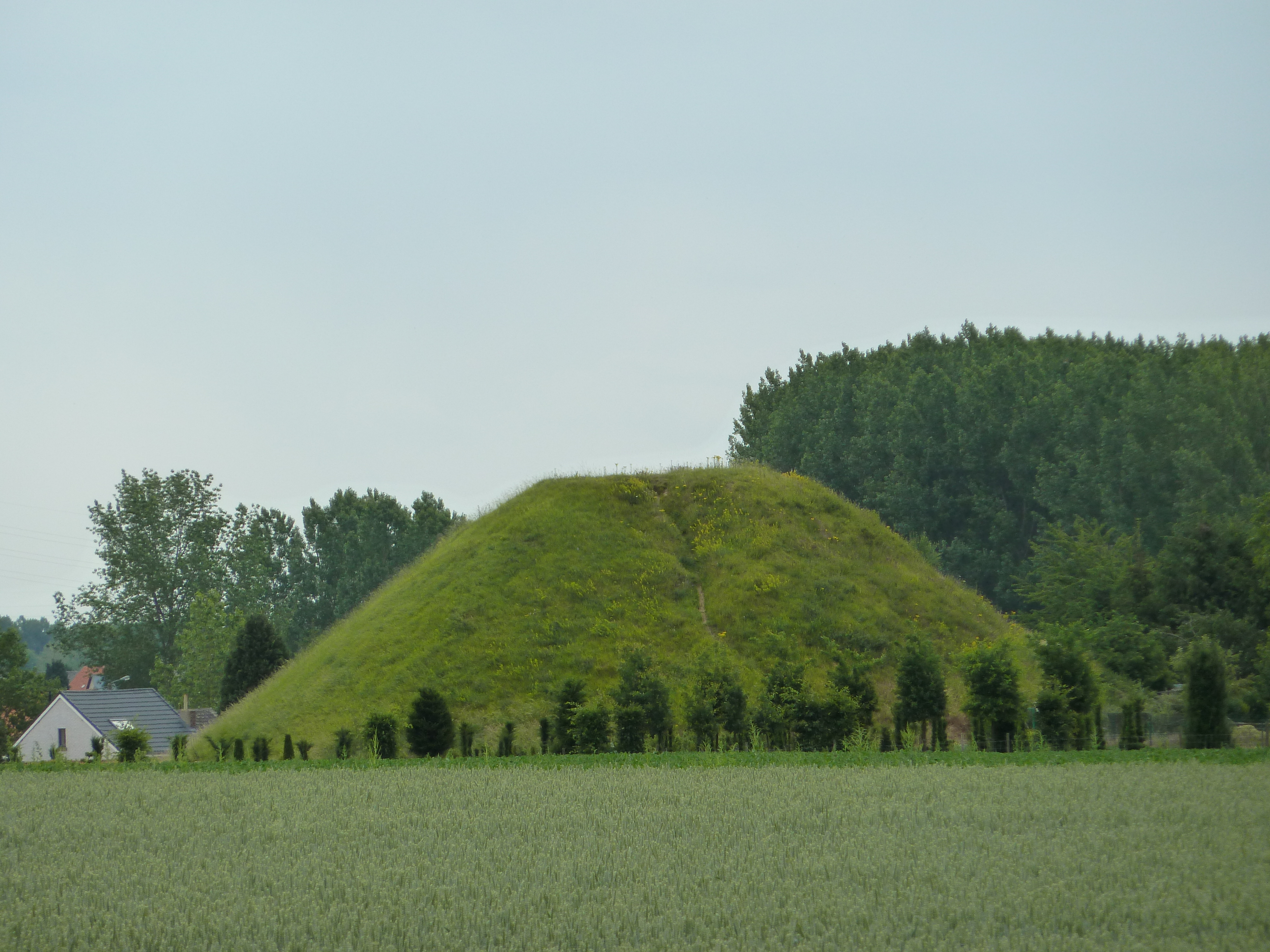 Tumulus Koninksem (Paardsweidestraat), Tongres, Belgiqiue